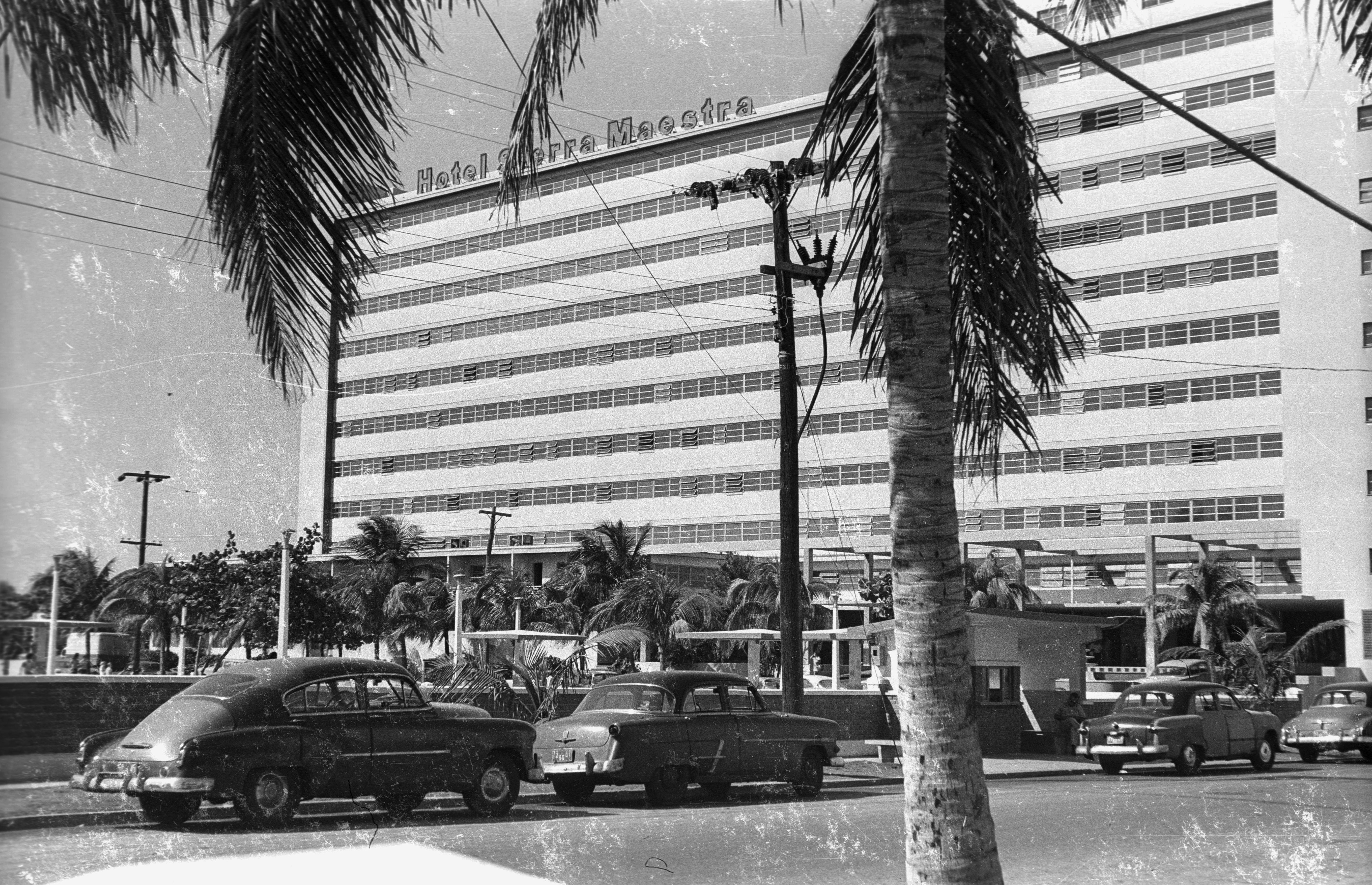 Avenida 1ra, a Hotel Sierra Maestra. Location: Cuba, La Habana Title: Avenida 1ra, a Hotel Sierra Maestra.